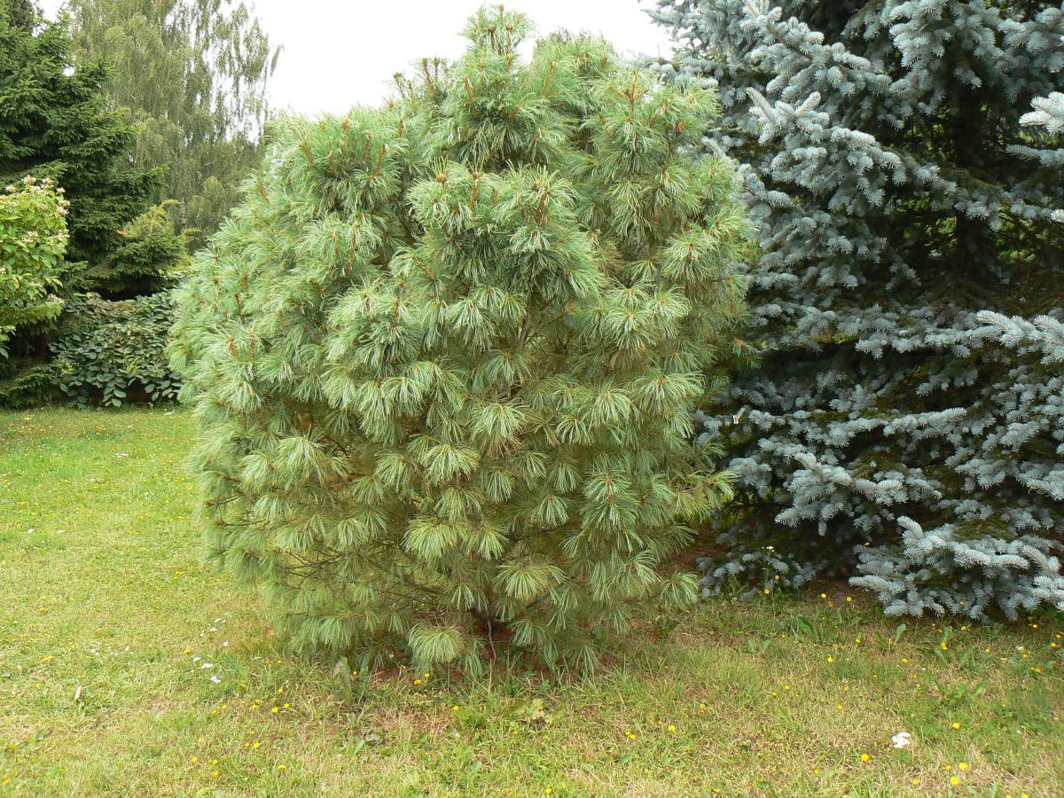 Kääbus-seedermänd (Pinus pumila) Tartus puukooli pargis